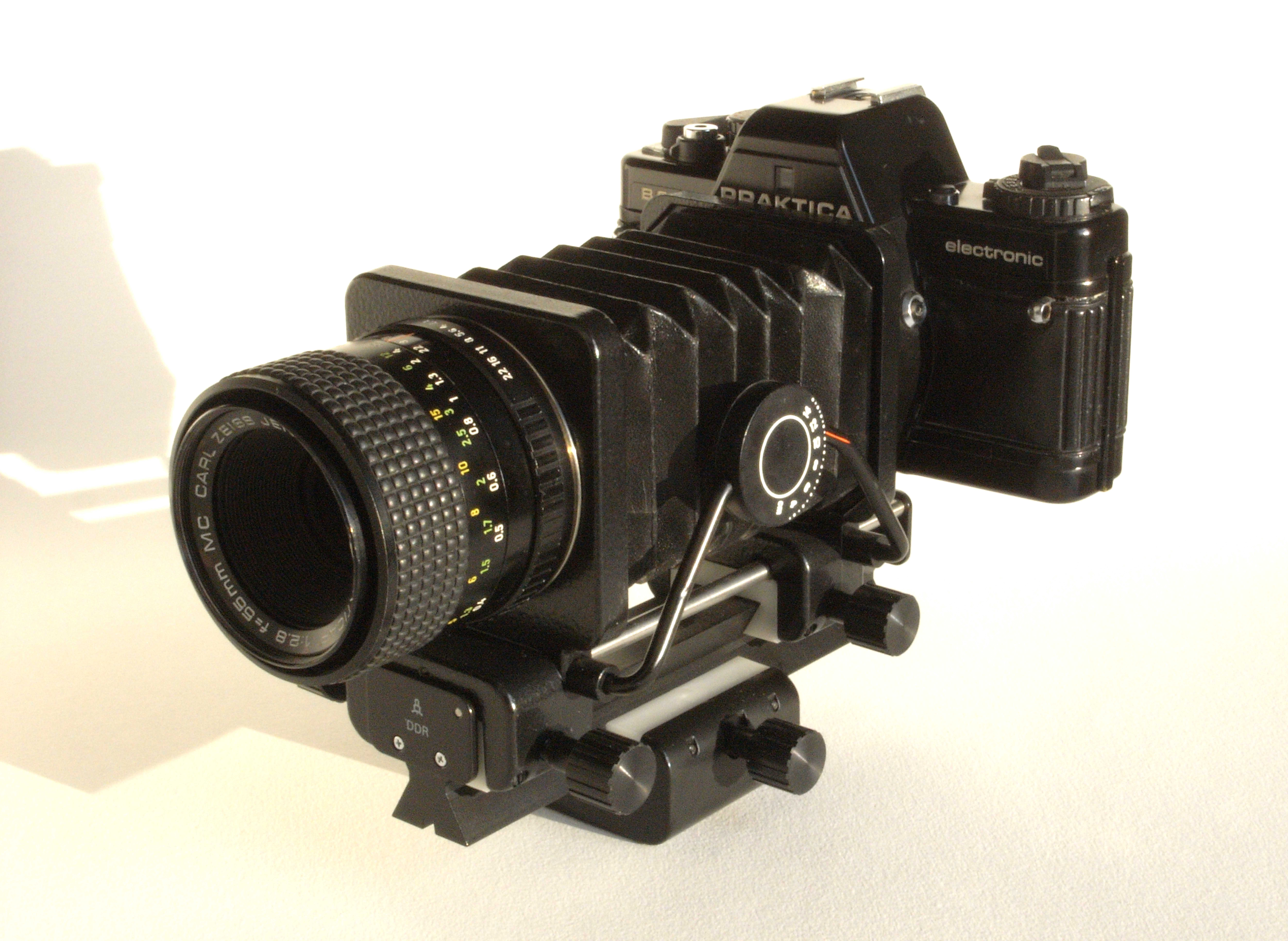 Kleinbildkamera Praktica BC1 mit Balgengerät und 55 mm-Makroobjektiv (Prakticar 55 / 1:2.8)